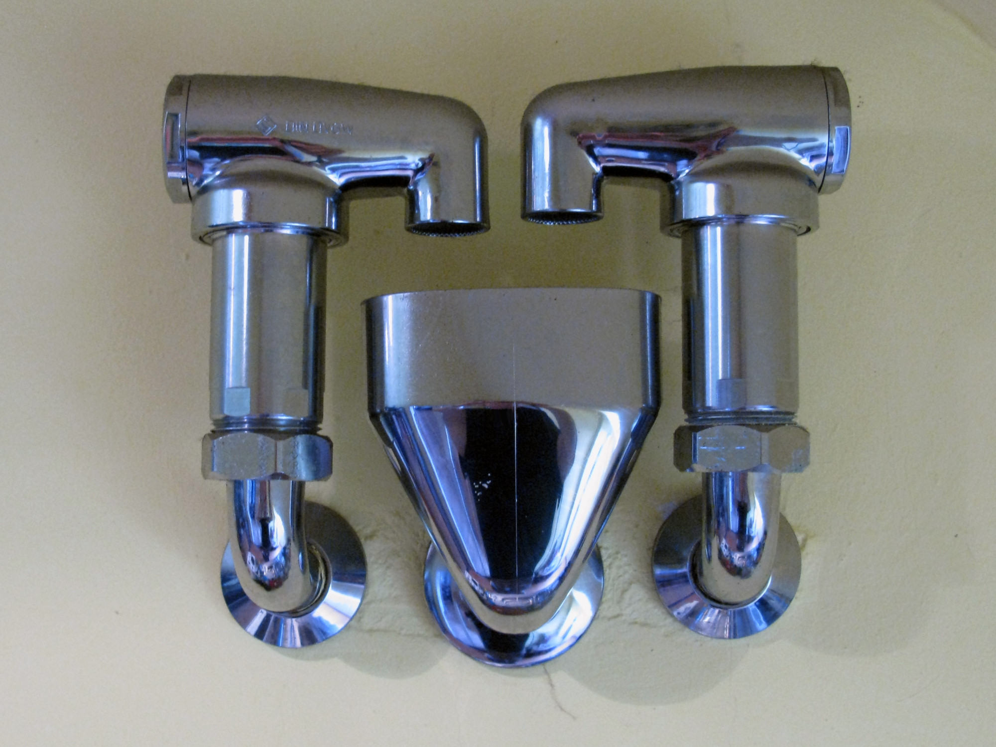 Rohrbelüfter